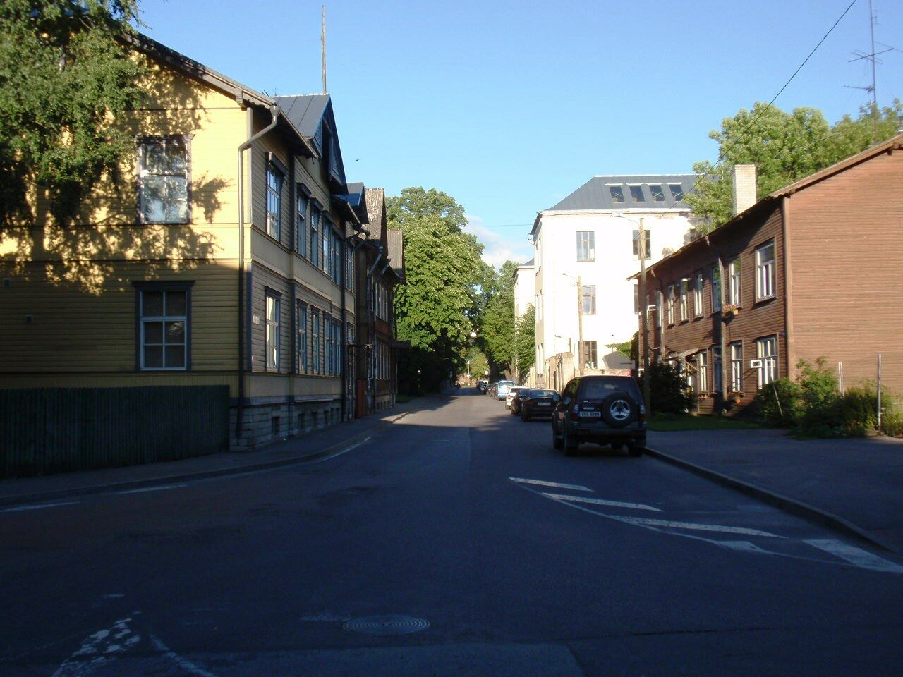 Niine tänav Tallinnas.